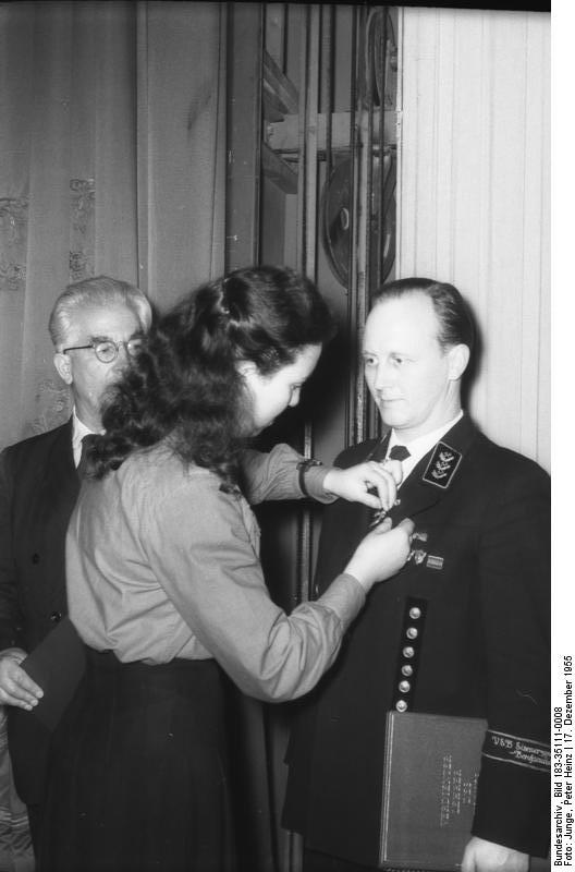 Berlin, Auszeichnung "Verdienter Lehrer des Volkes " Zentralbild/Junge, 17.12.1955 Auszeichnung der "Verdienten Lehrer des Volkes 1955" in der Deutschen Staatsoper zu Berlin Am Sonnabend, dem 17.12.1955, fand in einem feierlichen Staatsakt in der Deutschen Staatsoper die Auszeichnung von 32 "Verdienten Lehrern des Volkes 1955" statt. Die Festansprache hielt der Minister für Volksbildung, Fritz Lange, der auch die Auszeichnung vornahm. UBz: Dem Lehrer Hans-Heinz Paetzold, Unterwellenborn, wird die Medaille angesteckt.